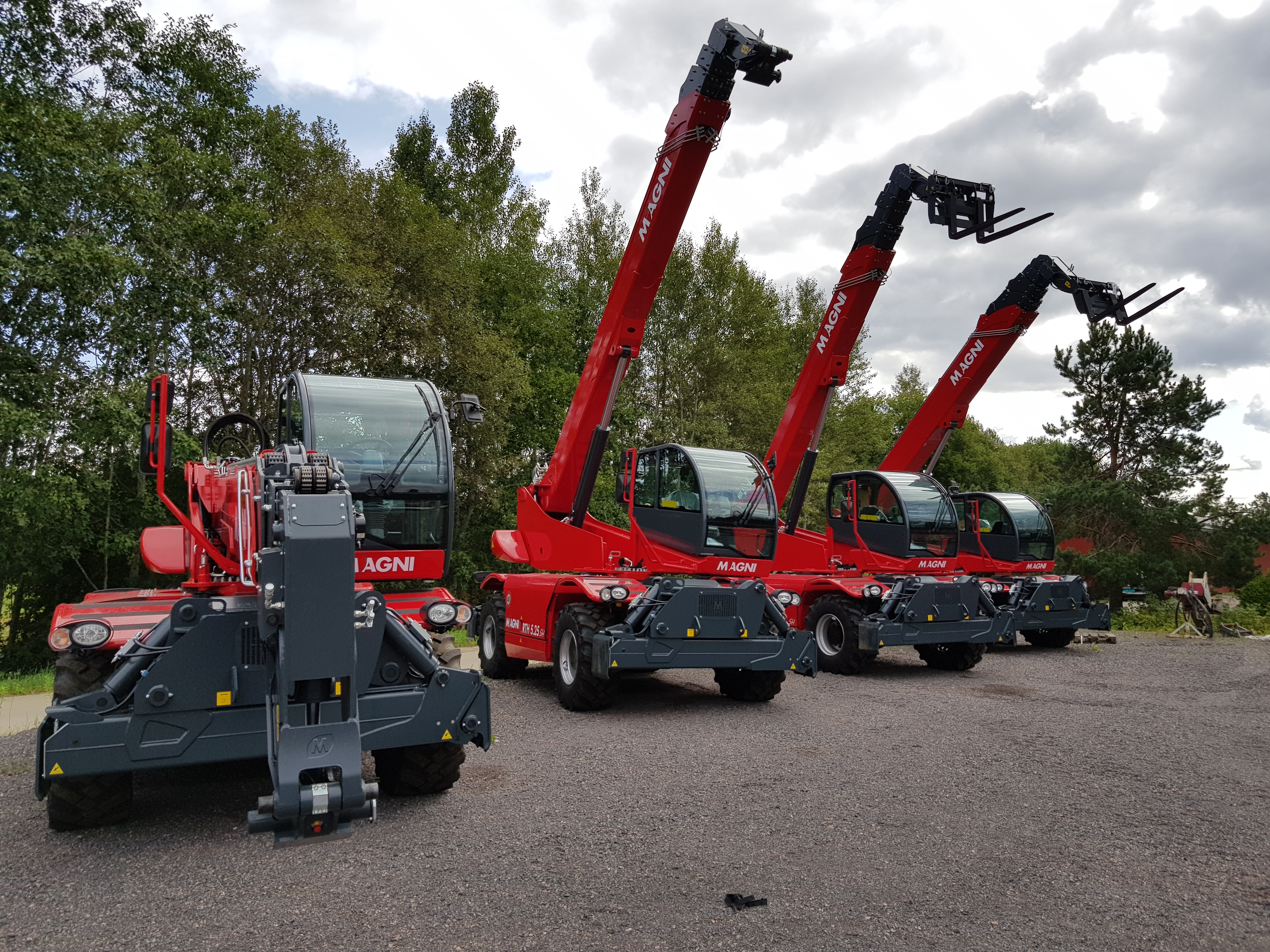 Magni teleskoptruck rundsvingende